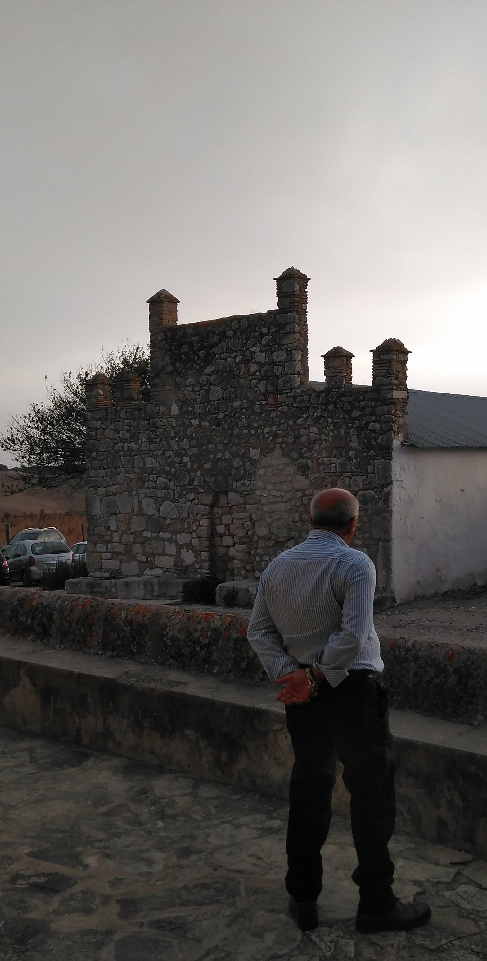 Resto de ermita visigoda en Gigonza